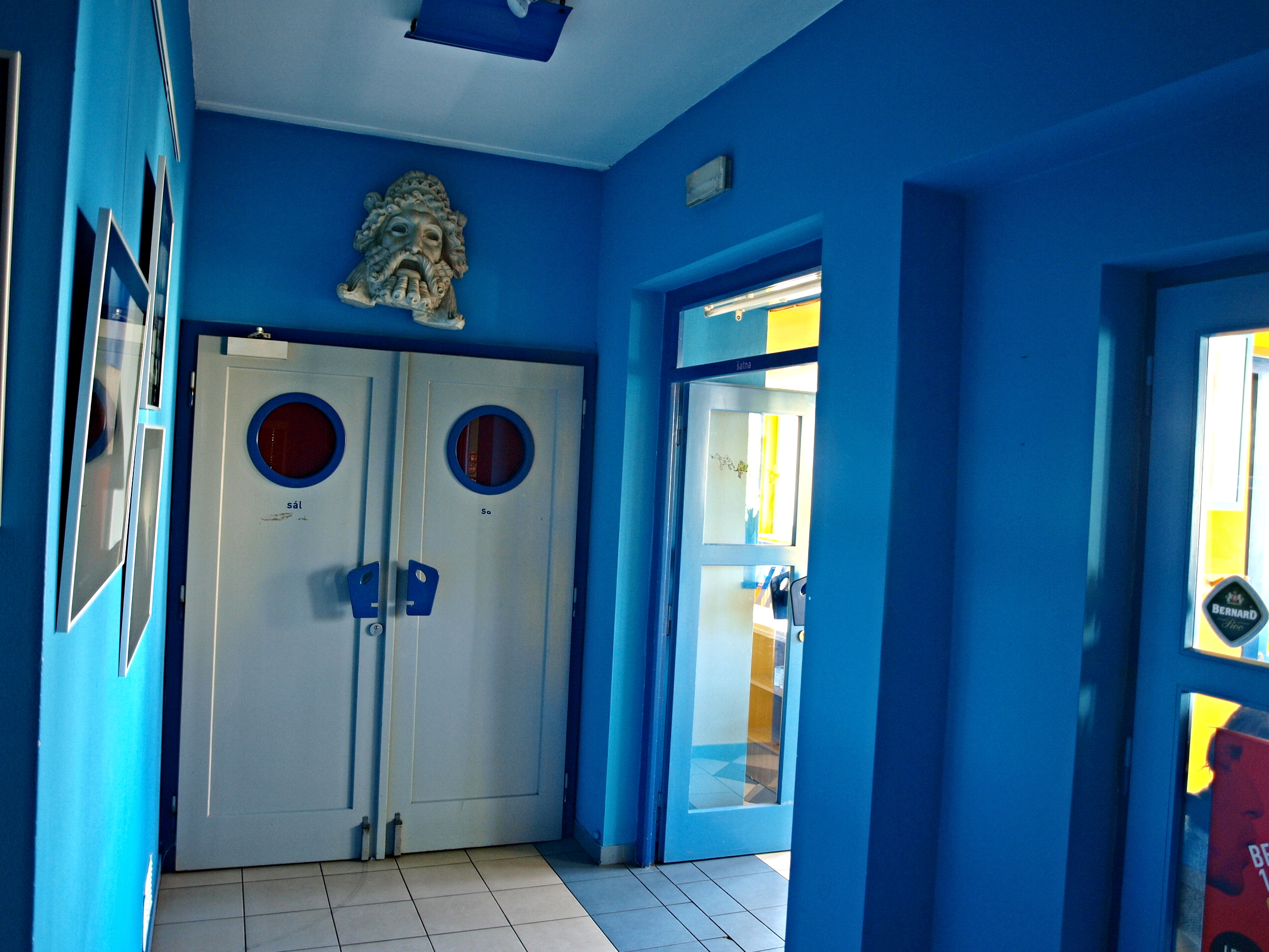 Braník, divadlo Dobeška